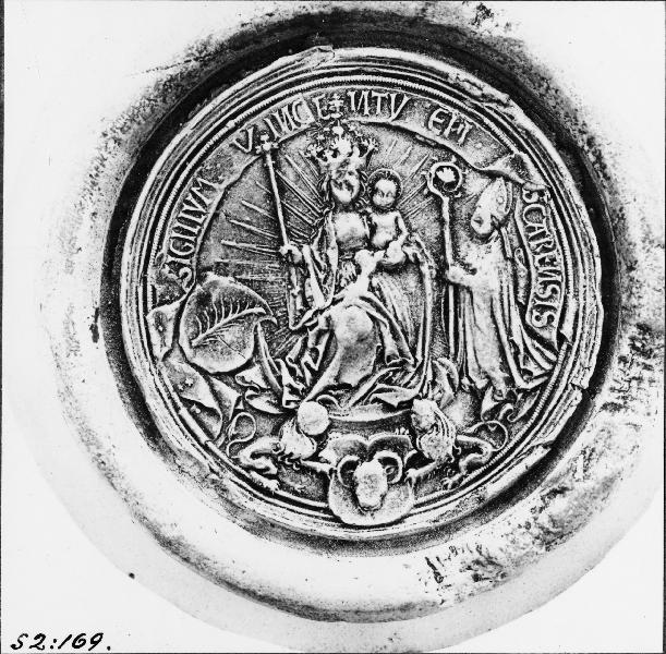 Sigill, Vincentius, biskop i Skara 1509, R.A. pergament. Kategori: (11) Diverse Sigill, Vincentius, biskop i Skara 1509, R.A. pergament.